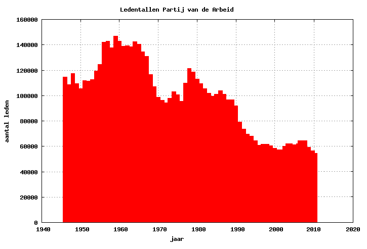 Ledenaantal van de PvdA, vernieuwd tot 2010